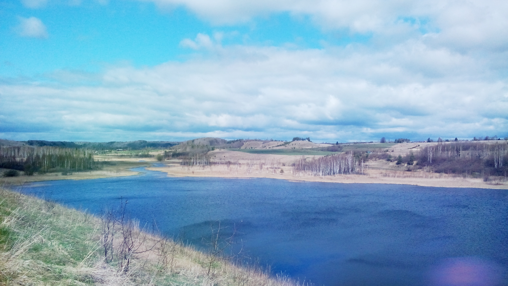 Городищенское озеро в мае